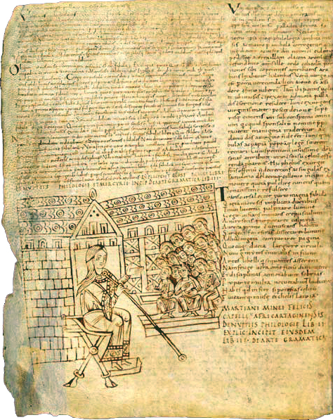 Martianus Capella, Noces de Philologie et de Mercure La Grammaire et son amphithéâtre d'élèves Commentaire partiel de Rémi d'Auxerre Italie (?), Xe siècle